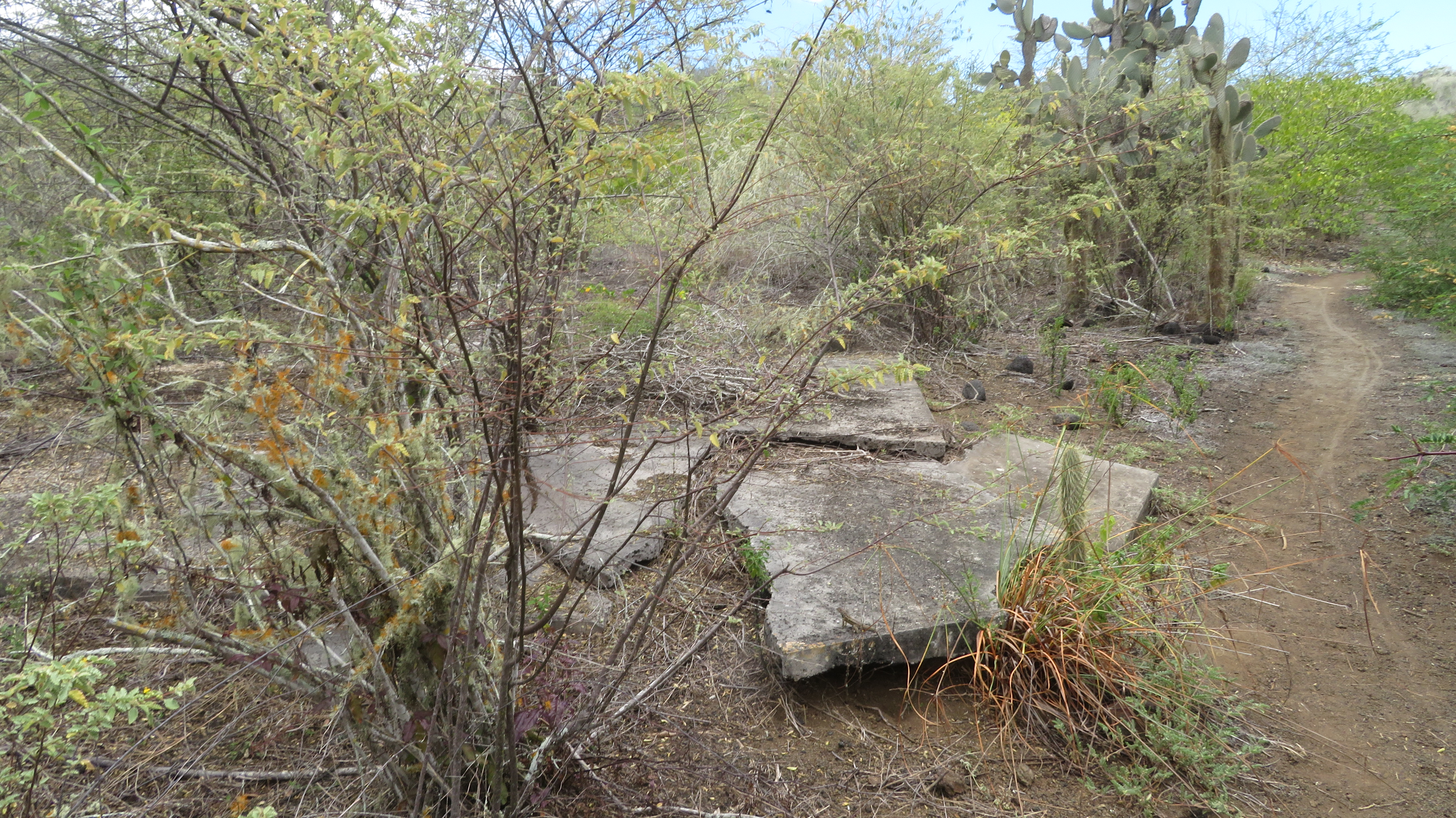 Ruinas de la colonia penal, cerca de Puerto Villamil, Isla Isabela, Islas Galápagos, Ecuador